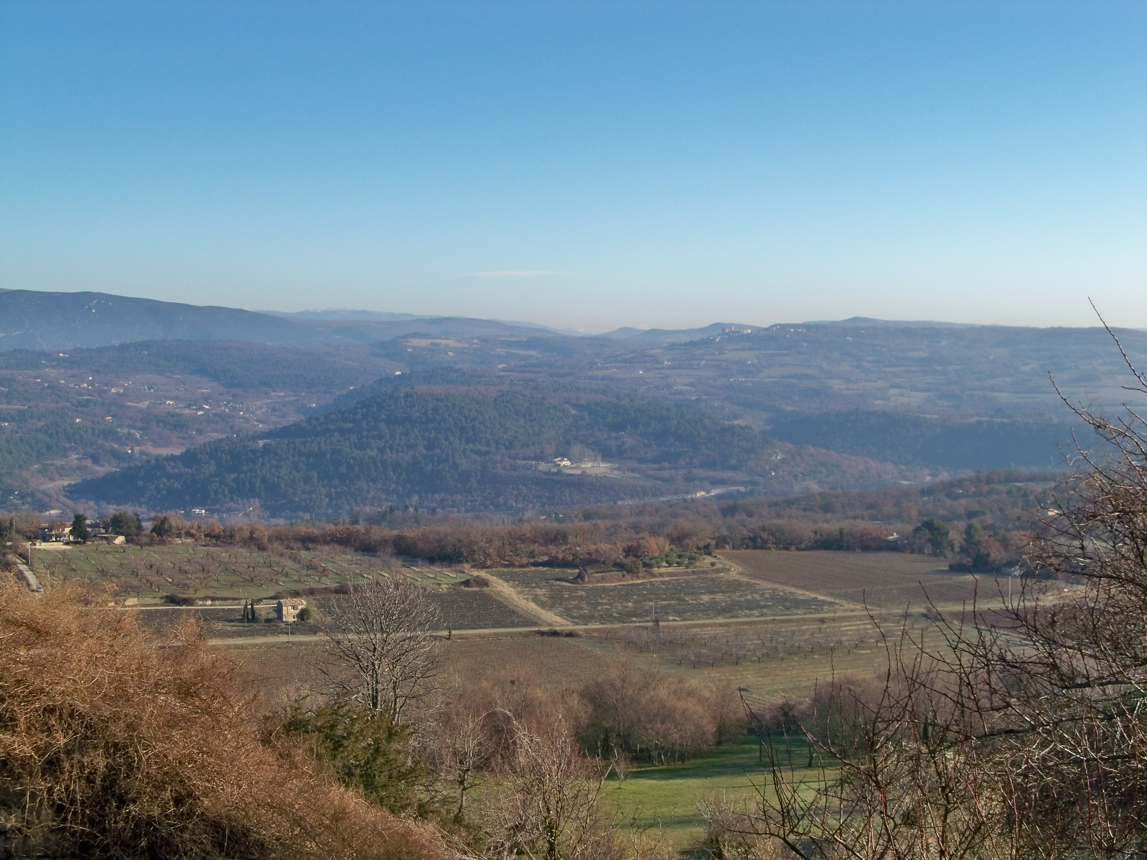 paysage autour de Saignon, Vaucluse, France